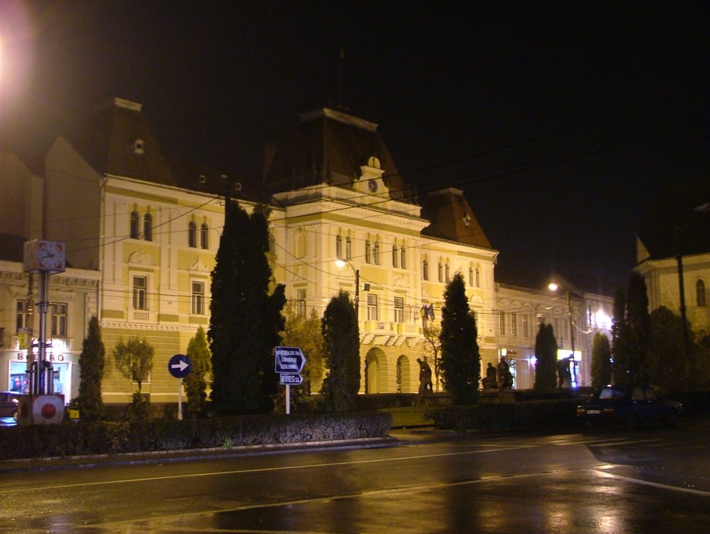 Székelyudvarhely, városháza a főtéren